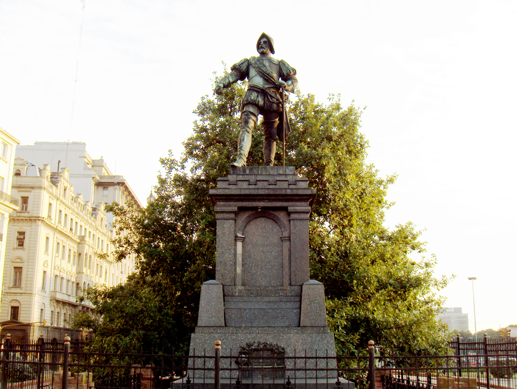 Monumento a Juan de Garay, en la Plazoleta 11 de Junio de 1580. San Nicolás, Buenos Aires. El roble de atrás es un retoño del árbol de Guernica, símbolo del País Vasco.